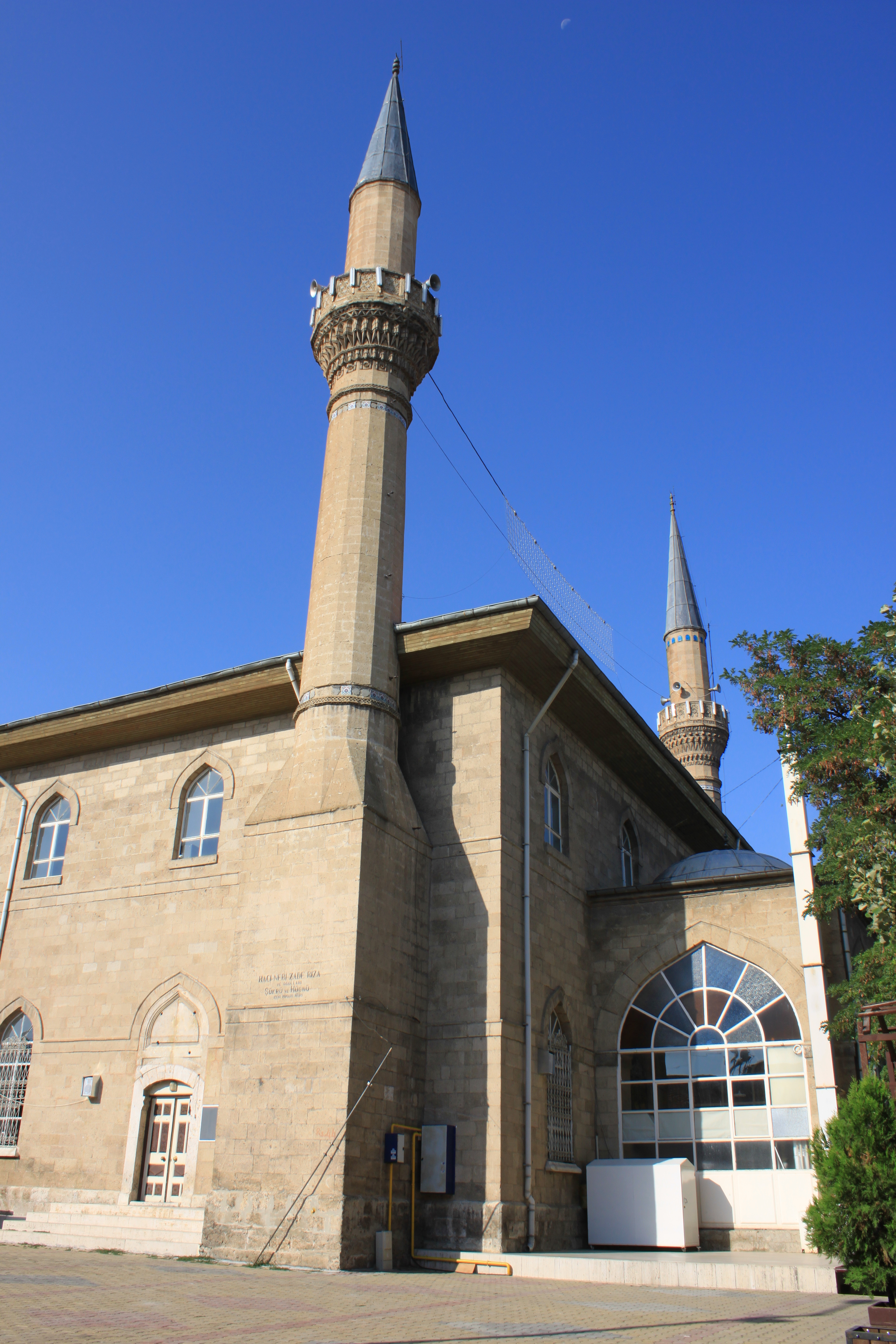 Burdur; Ulu Cami ("große Moschee"), erbaut 1300 unter Feleküddin Dündar Bey, durch Erdbeben1914 zerstört, bis 1930 wieder aufgebaut.